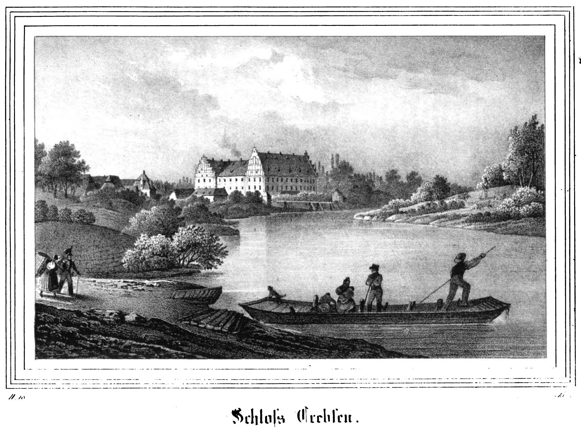 Saxonia Museum für saechsische Vaterlandskunde. Band 2. Dresden: Pietzsch und Comp. Siehe File:Saxonia Museum für saechsische Vaterlandskunde II.djvu